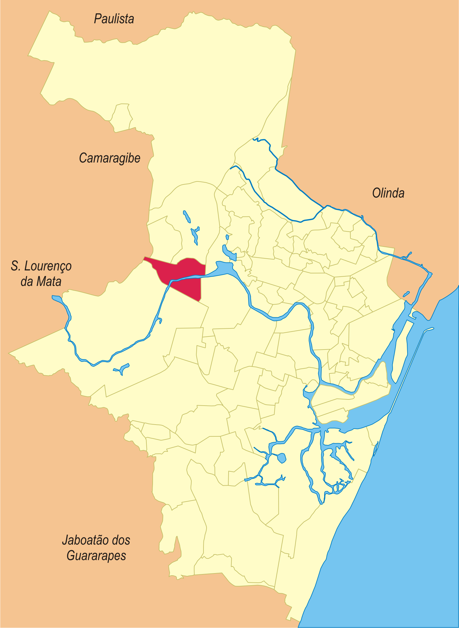 Localização do bairro no Recife